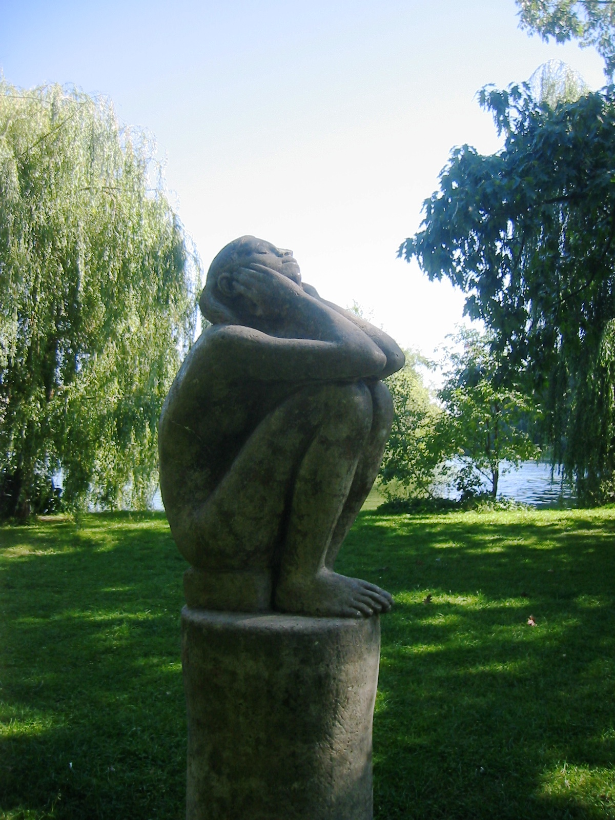 Kunststeinskulptur "Die Sonnenanbeterin" von Eberhard Bachmann im Obersee in Berlin Alt-Hohenschönhausen